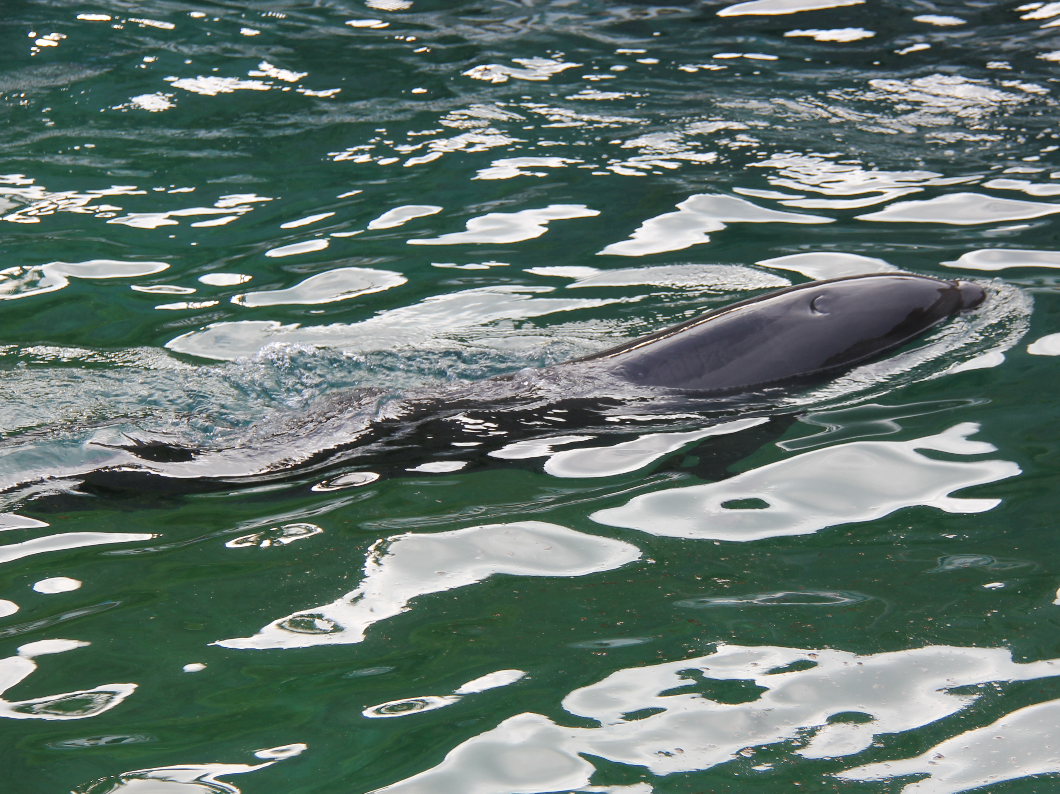 false killer whale+dolphin